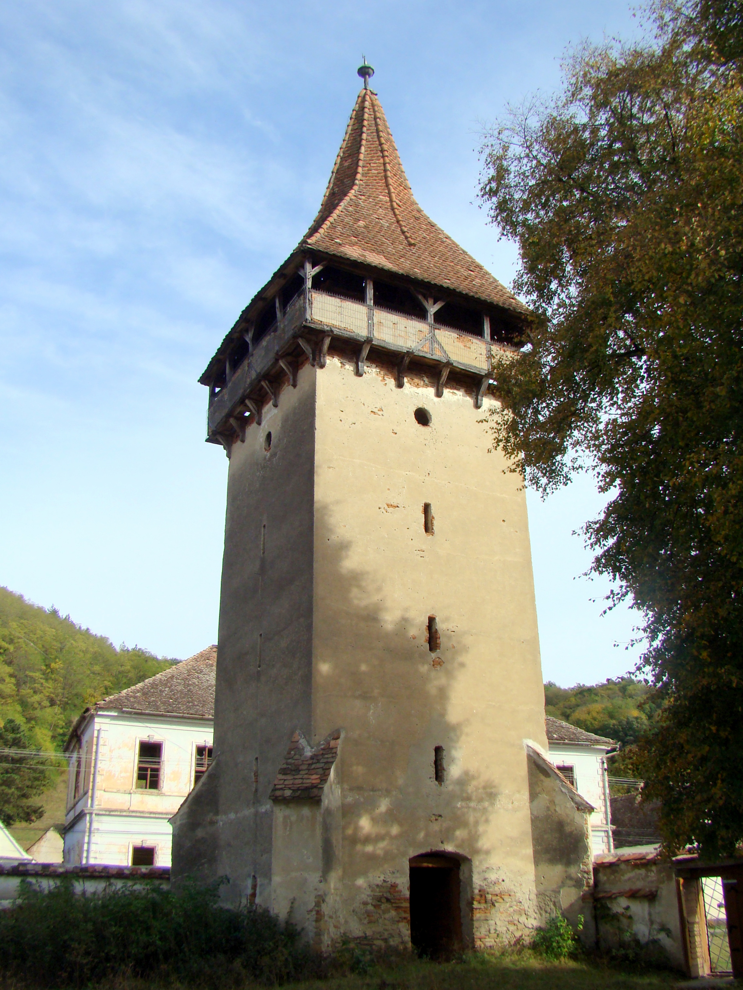 Zidul de incintă, cu turnul-clopotniță, sat Ormeniș; comuna Viișoara Str. Principală 204 sec. XVIII 02